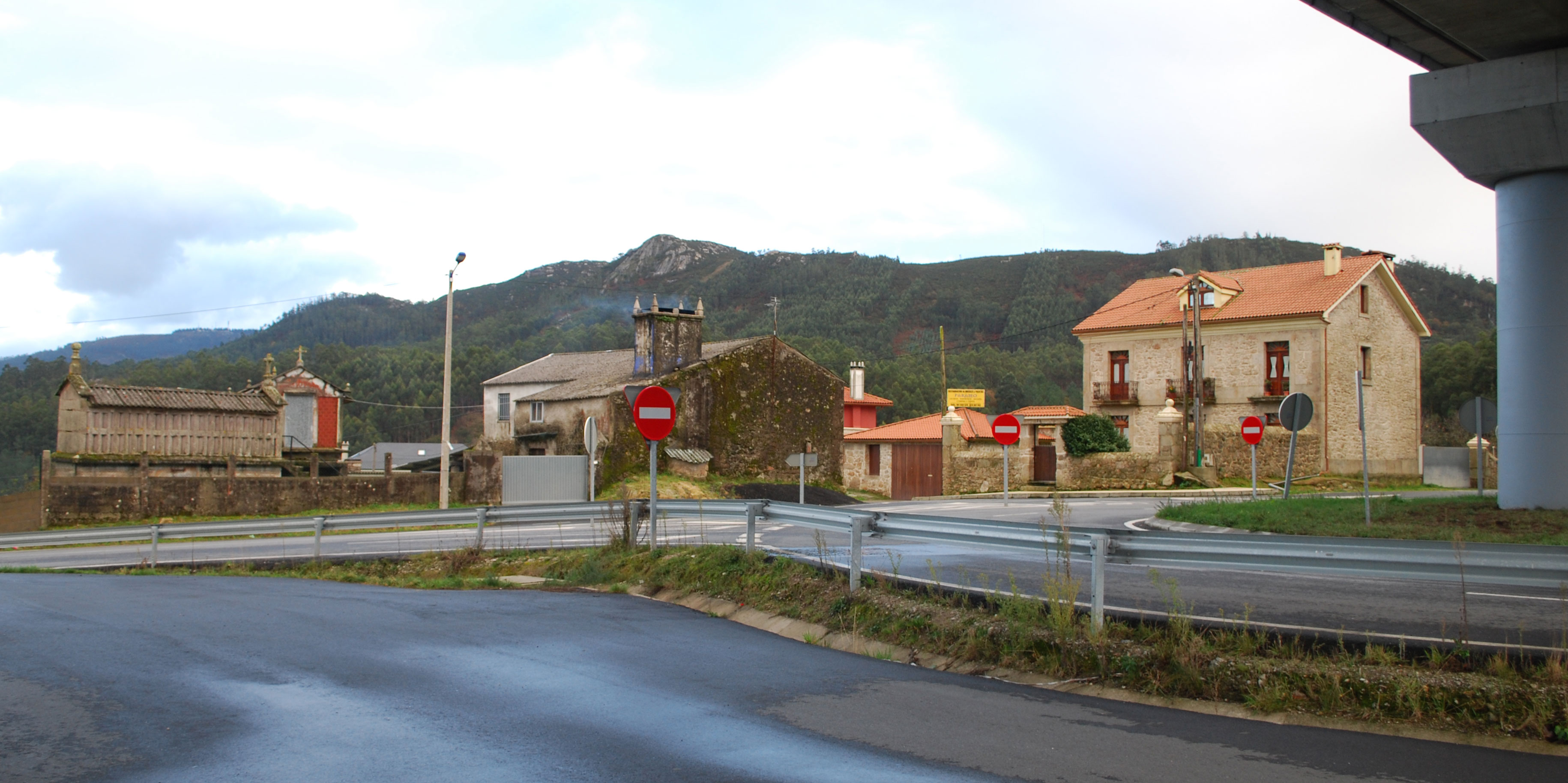 vista de boedo baixo a liña do ave